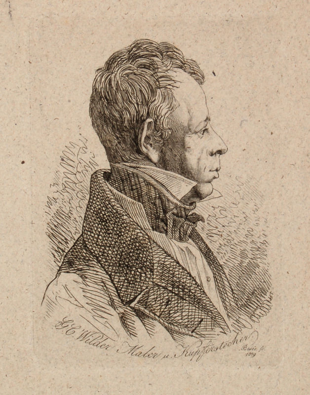 Portrait Georg Christoph Wilder, Maler und Kupferstecher